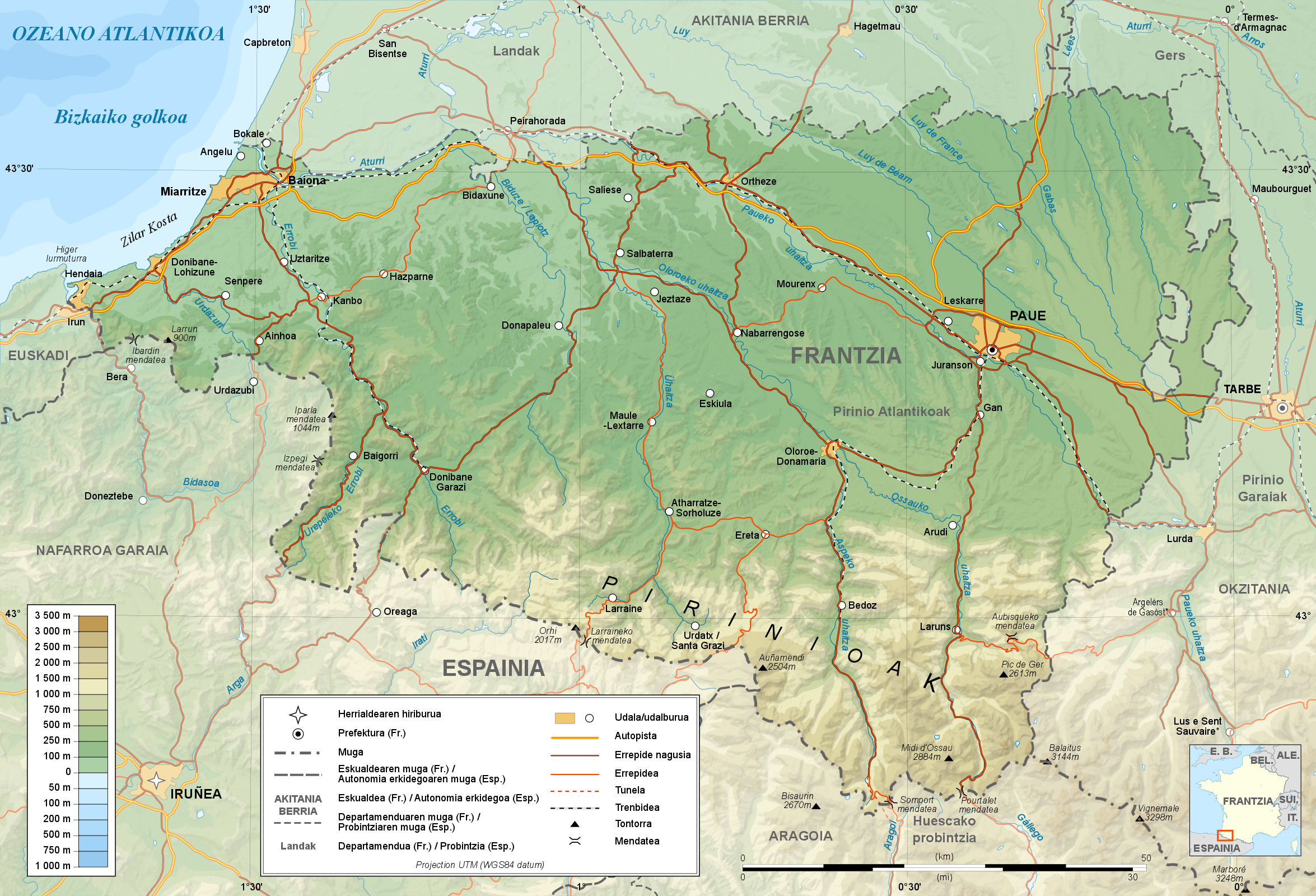 Pirinio Atlantikoak